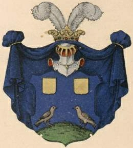 Agthe suguvõsa aadlivapp